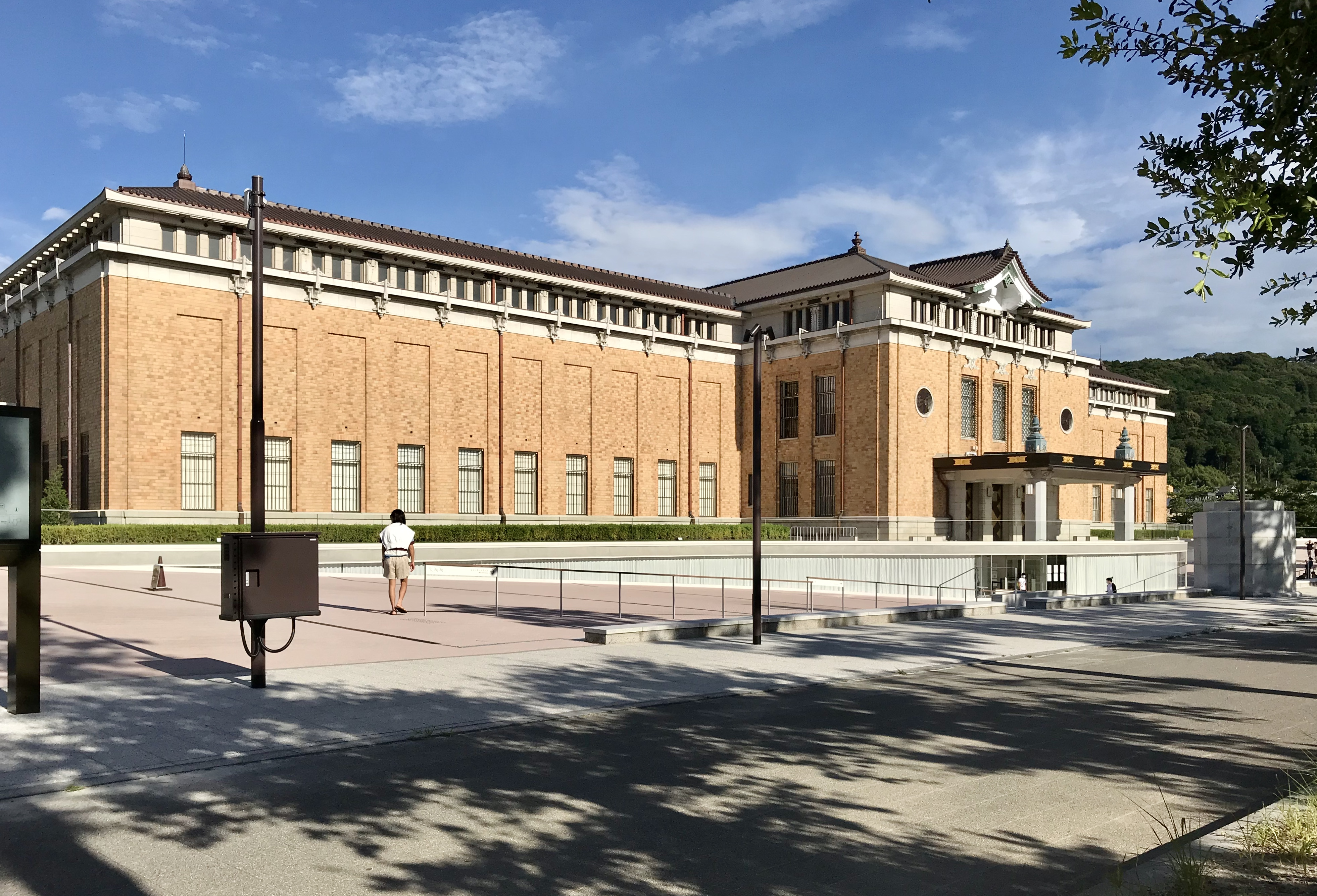 京都市京セラ美術館（京都市美術館）リニューアル後の外観